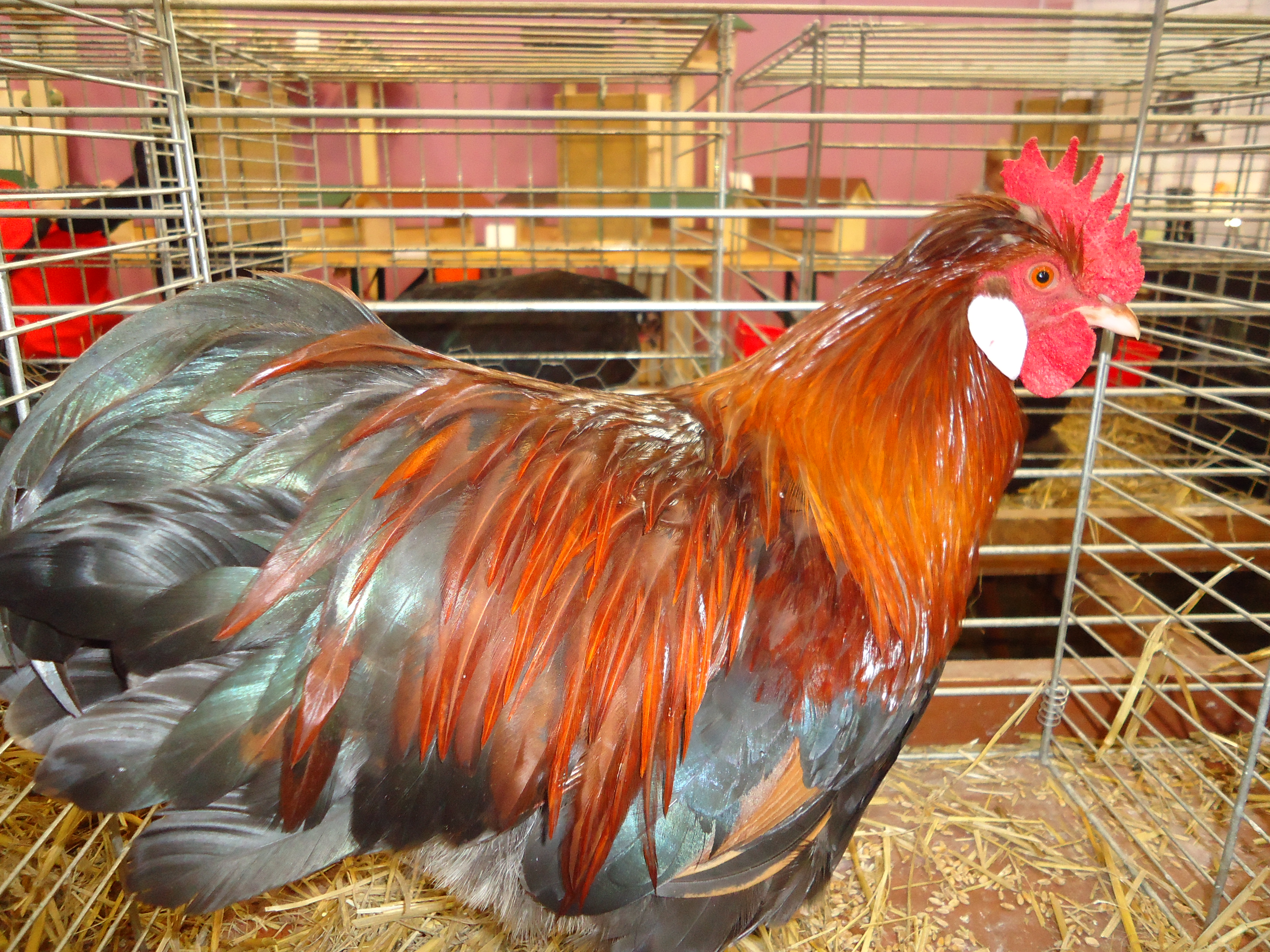 Coq Sulmtaler